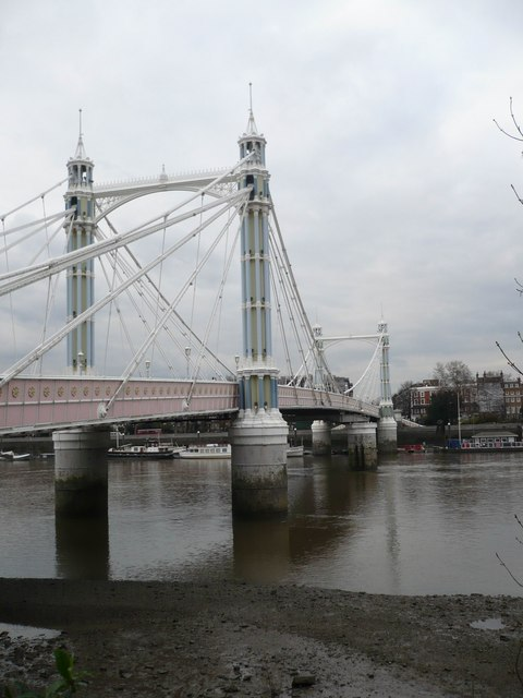 Albert Bridge taken near Battersea Park